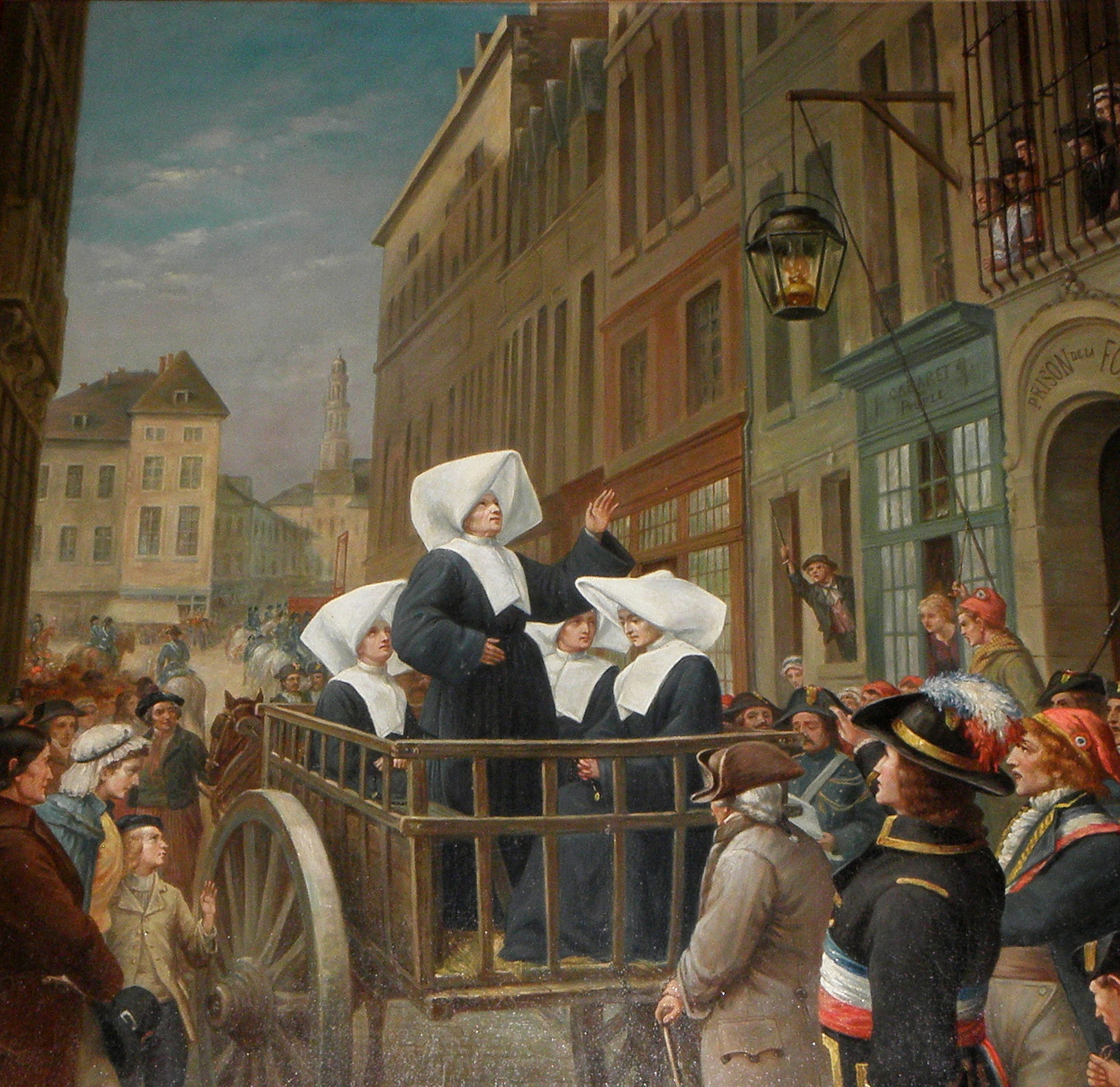 Intérieur de l'église Saint-Pierre de Miniac-Morvan (35).